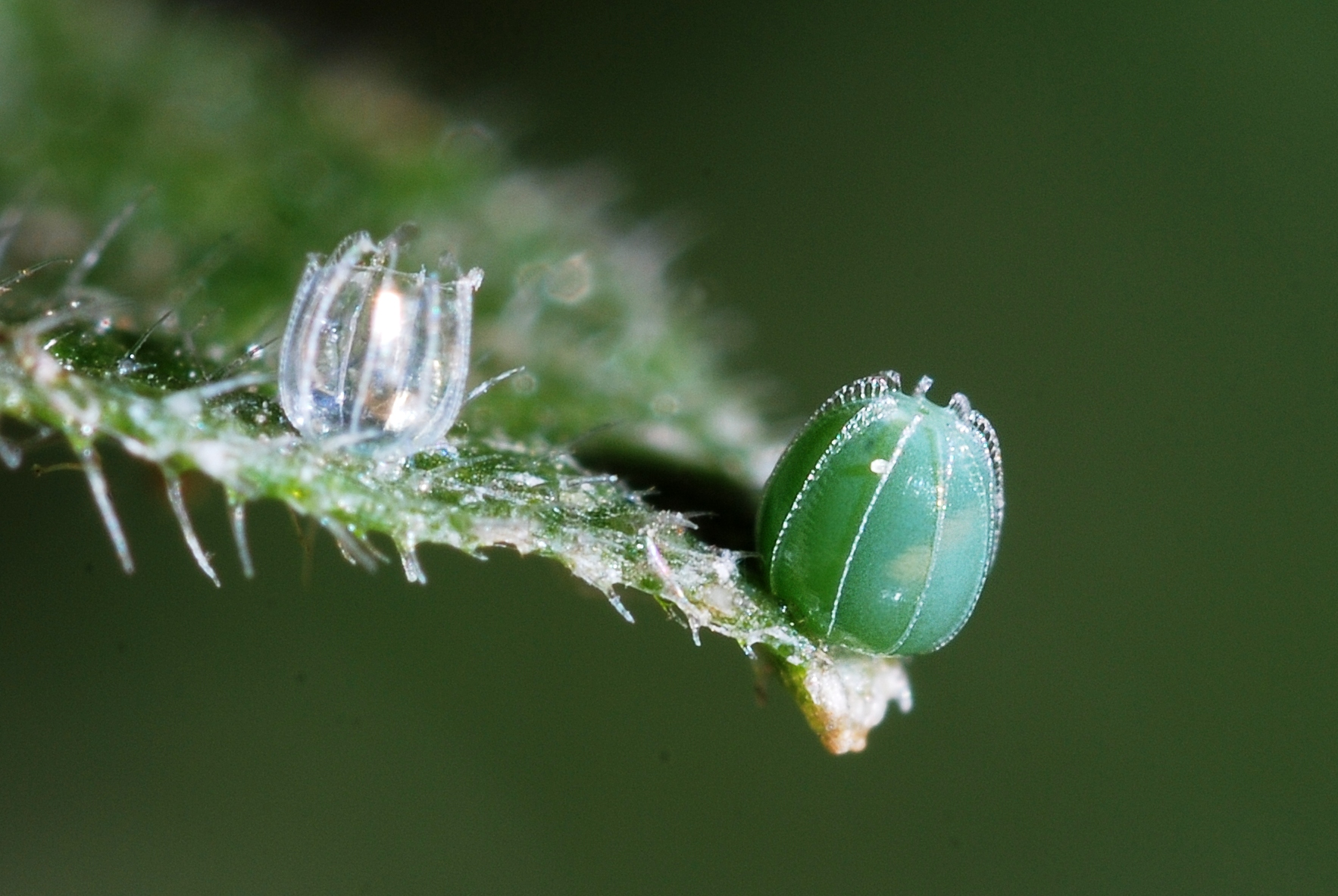 Polygonia c-album eggs